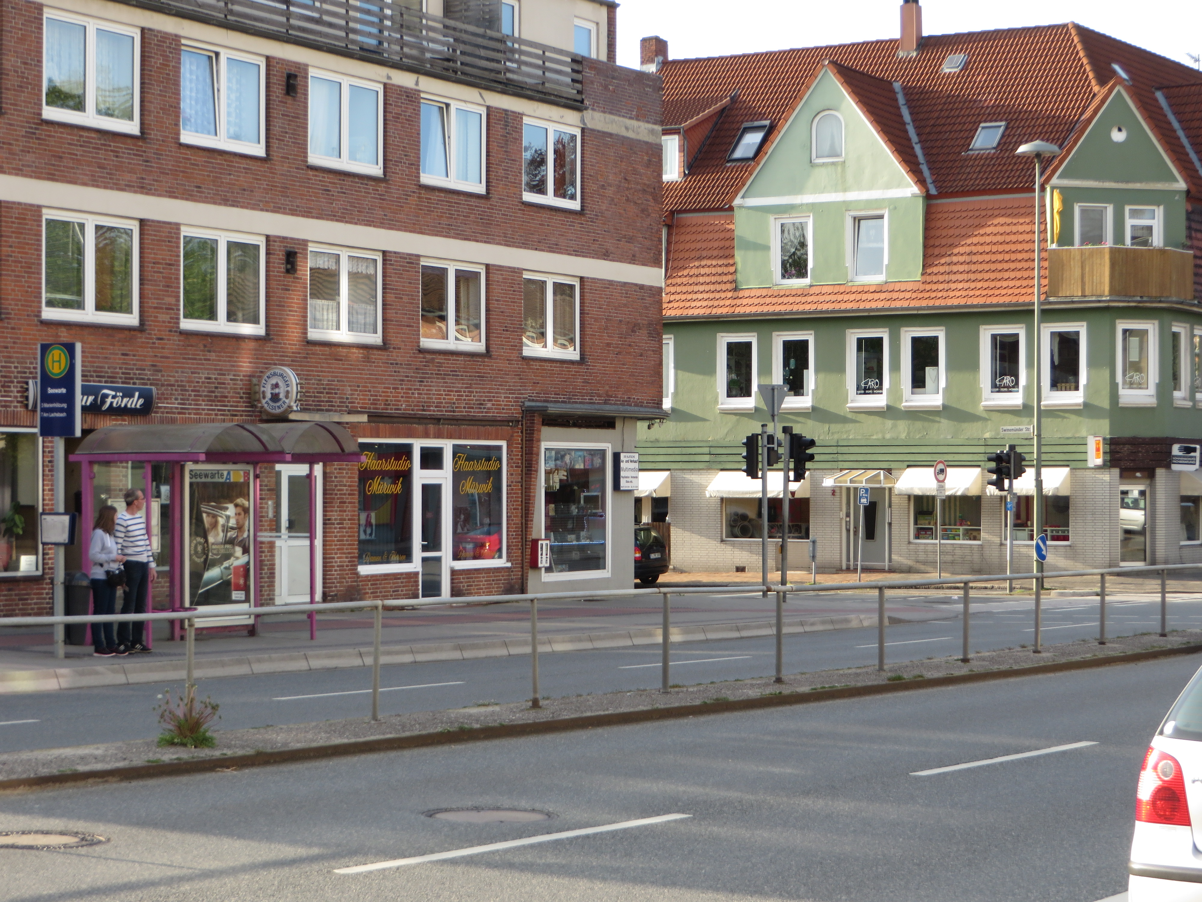 Alt-Mürwiker Zentrum bei der Seewarte (Flensburg Mai 2015)